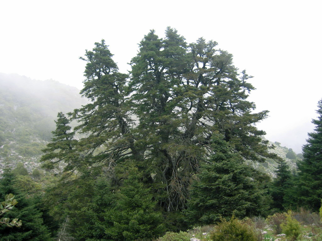 Abies pinsapo, large old specimen "Pinsapo de las Escaleretas". Sierra de las Nieves, Andalucía, España.